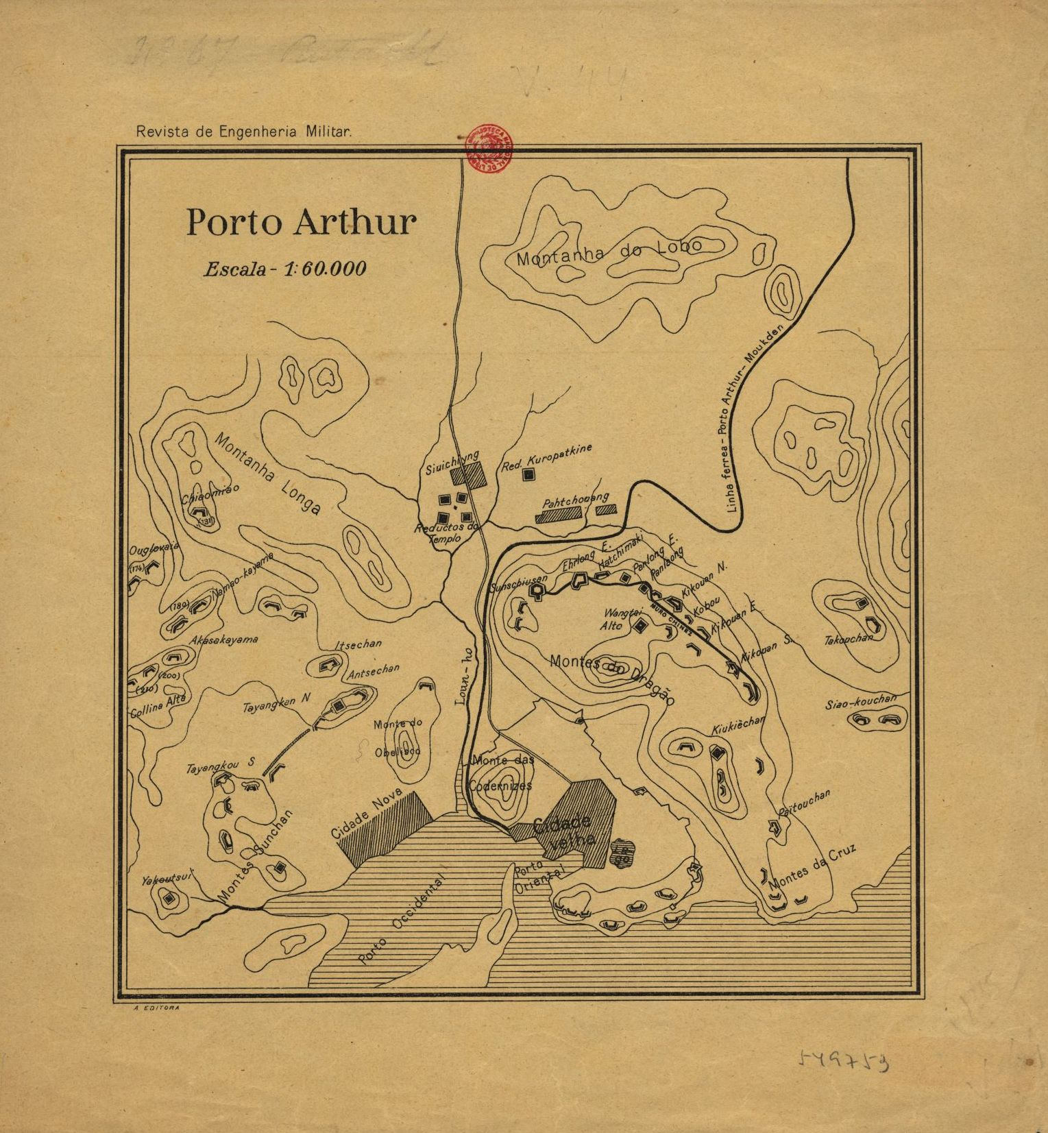 Data atribuída em conformidade com o conflito Russo - Japonês (1904 -1905) que se desencadeou no inicio de 1904, com o ataque do Japão a uma esquadra russa, no porto chinês de Porto Arthur